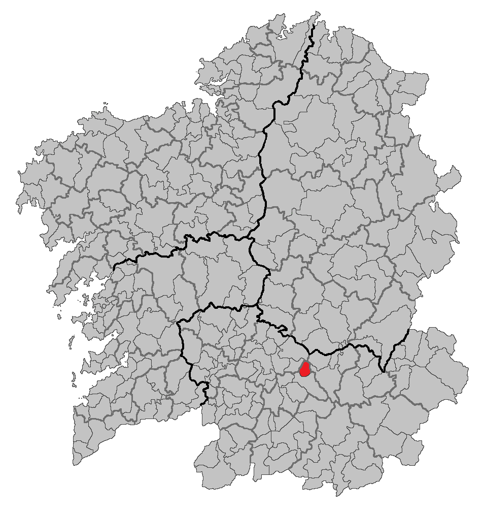 Mapa coa localización do concello de Xunqueira de Espadanedo.